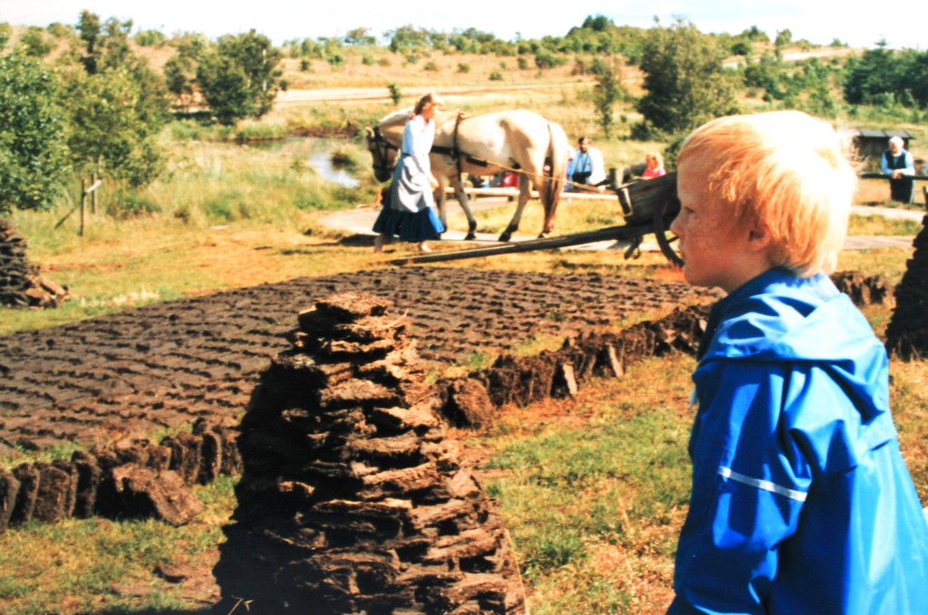 Dänemark, Torftrocknung in 2 Stufen, am Boden und geringelt)